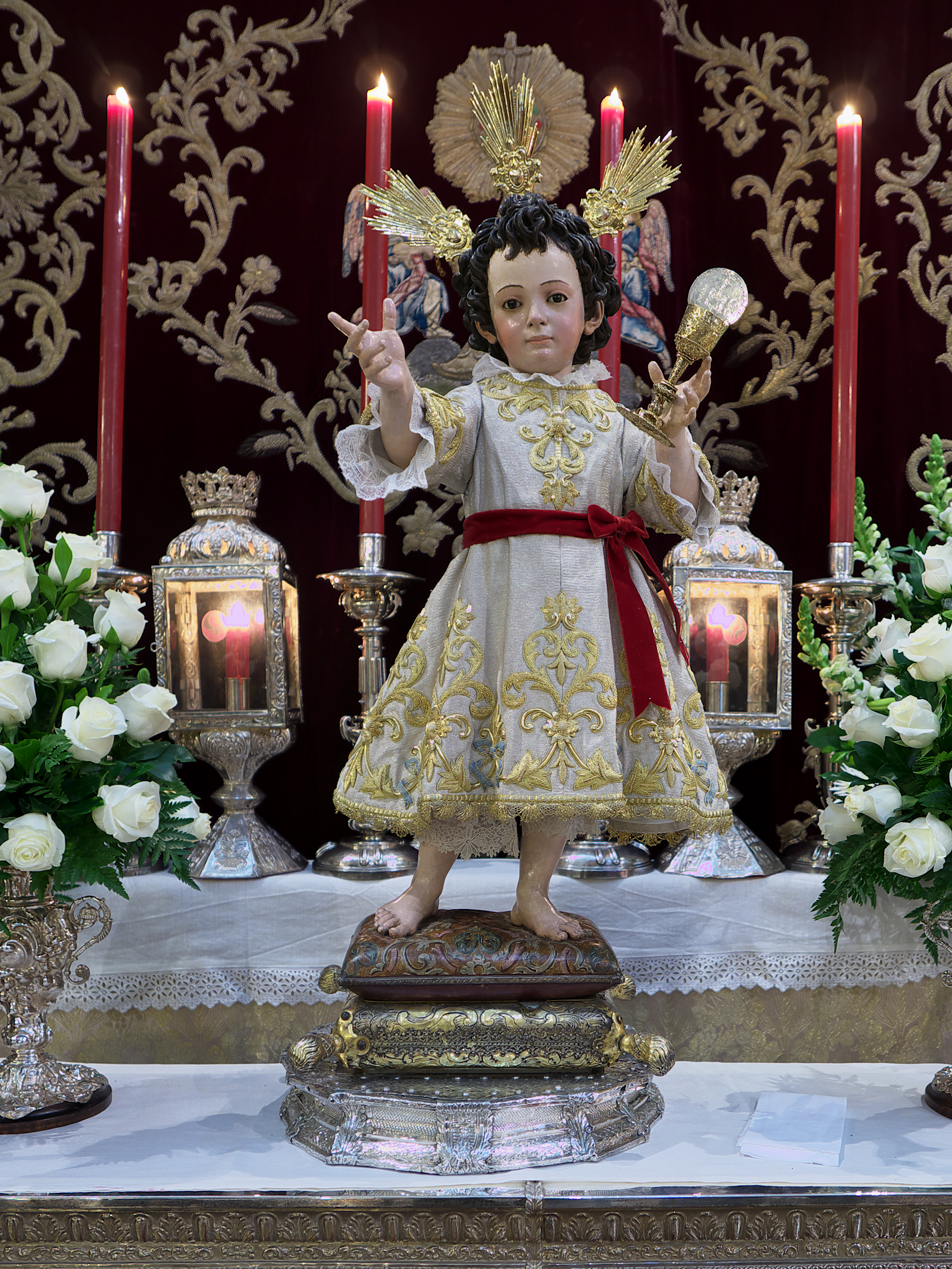 Iglesia del Sagrario (Sevilla). Imagen titular de la Pontificia e Ilustre Archicofradía del Santísimo Sacramento del Sagrario de la Metropolitana y Patriarcal Iglesia Catedral de Sevilla. Tallada por Juan Martínez Montañés (1607) con policromía de Gaspar de Ragis. Nuevamente establece otro modelo en la iconografía cristiana.